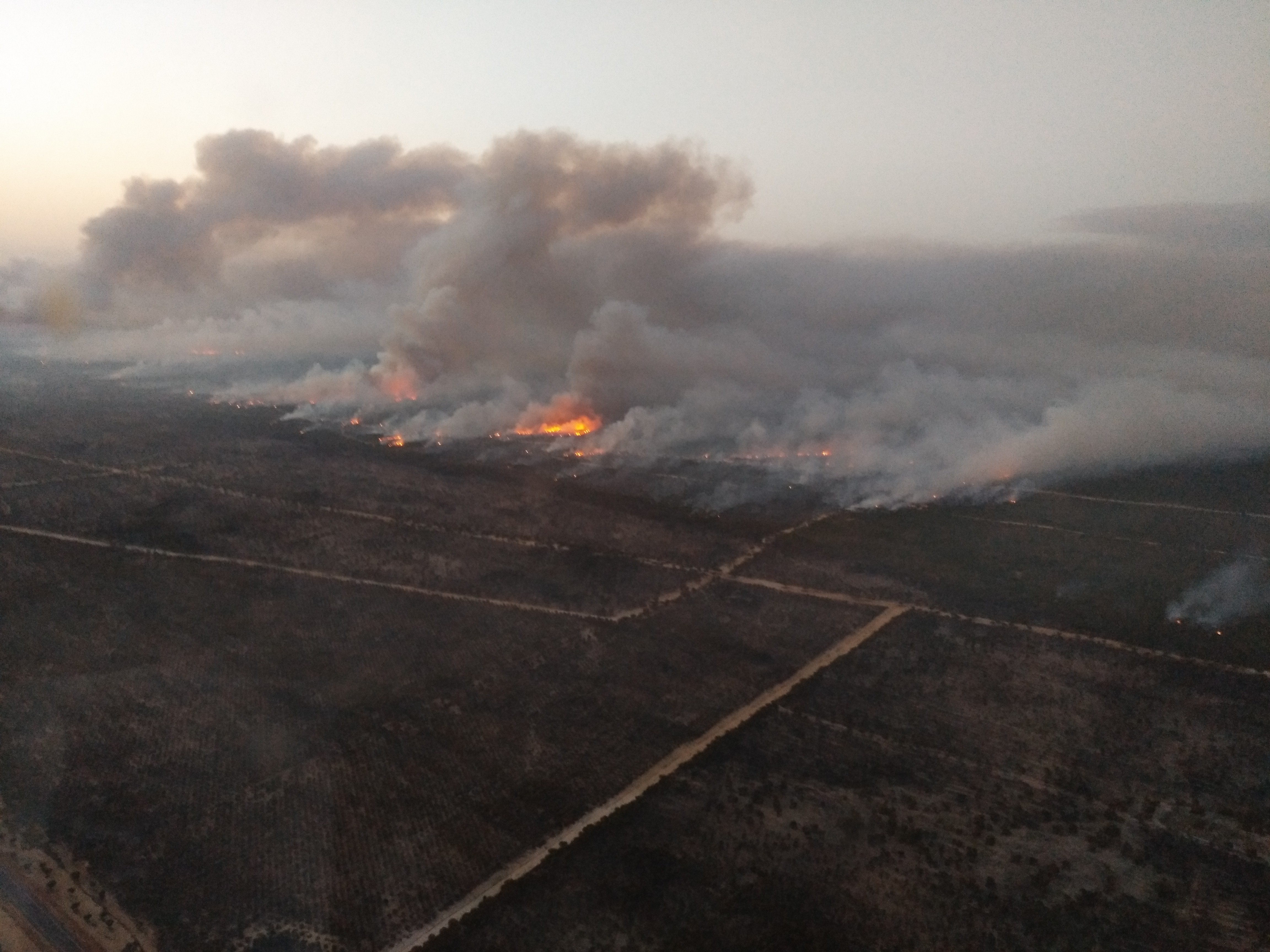 Doñana This is a photography of a Site of Community Importance in Spain with the ID: ES0000024. Natura2000 entry, EEA entry